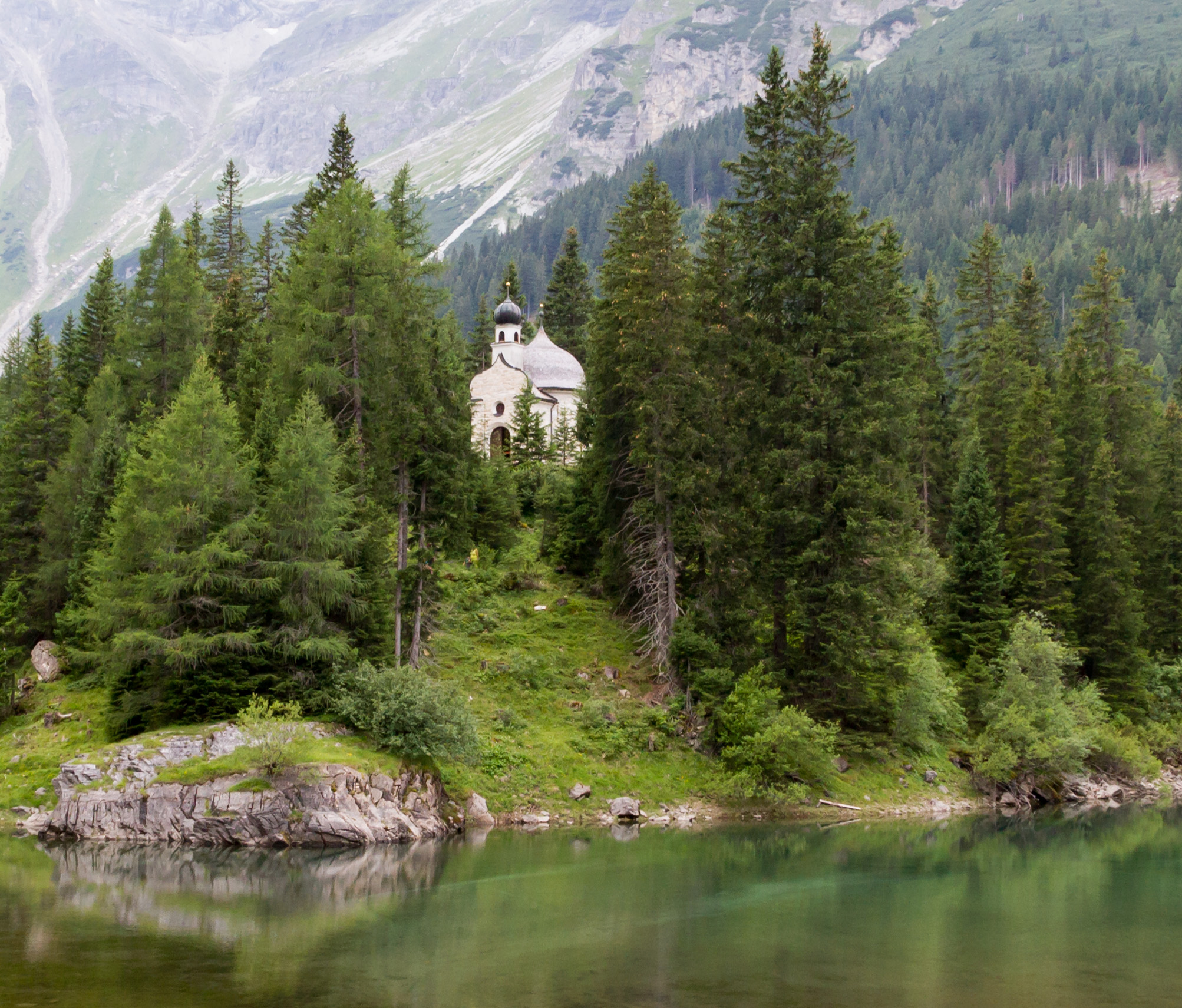 Obernbergersee- Kapelle